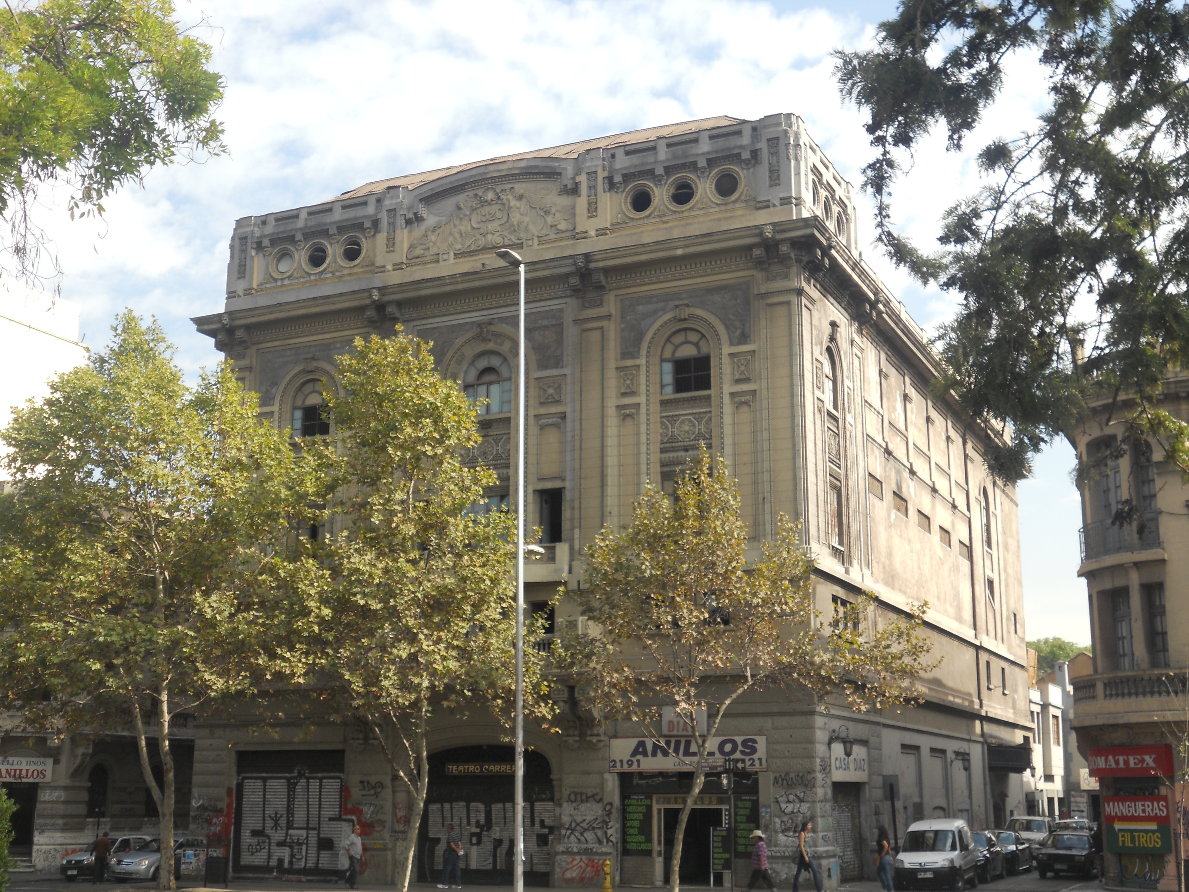 Teatro Carrera This is a photo of a national monument in Chile: 1668